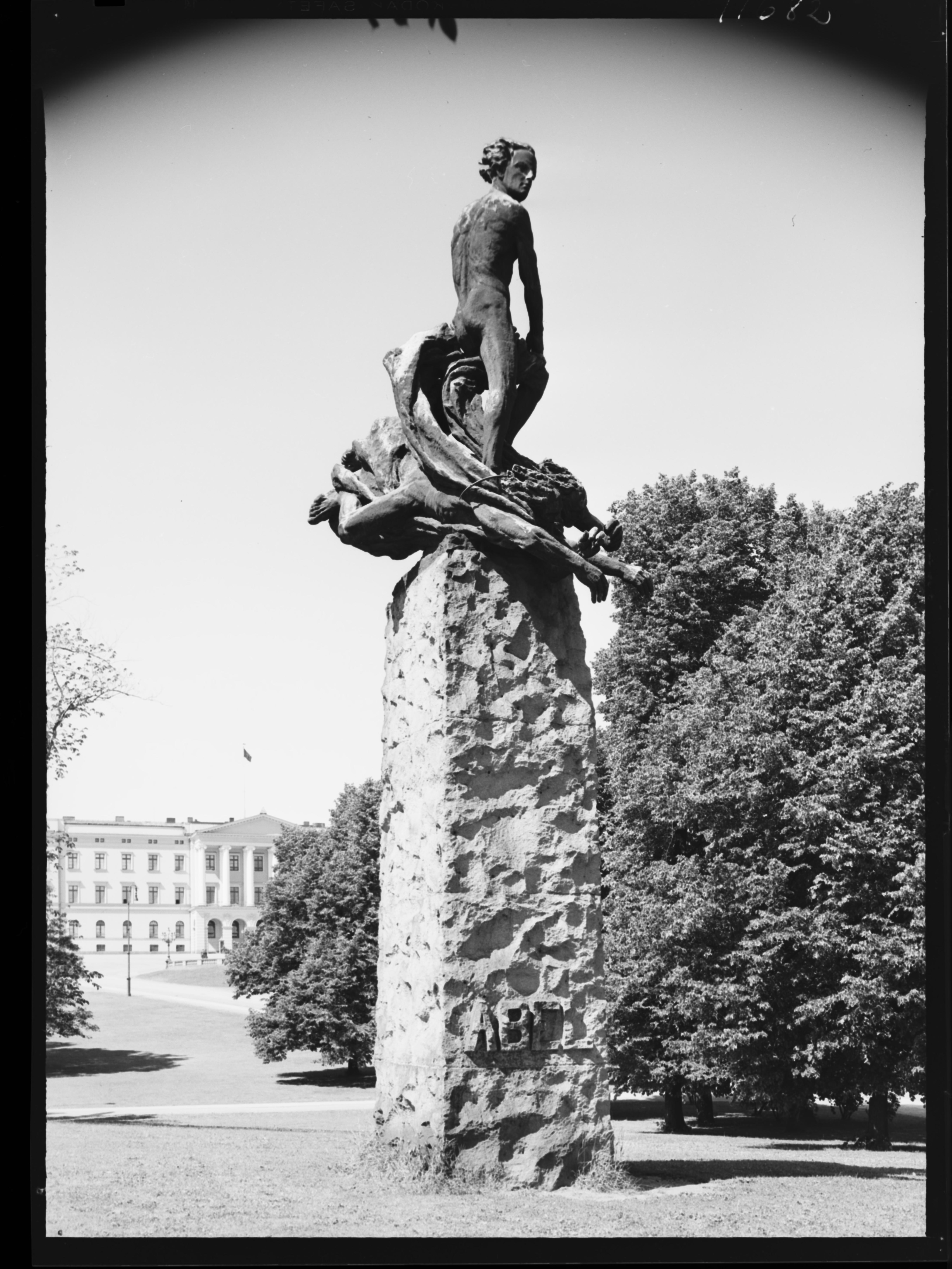 Bildet er hentet fra Nasjonalbibliotekets bildesamling. Anmerkninger til bildet var: Fotograf ukjent Abelhaugen,Oslo, Oslo, Oslo